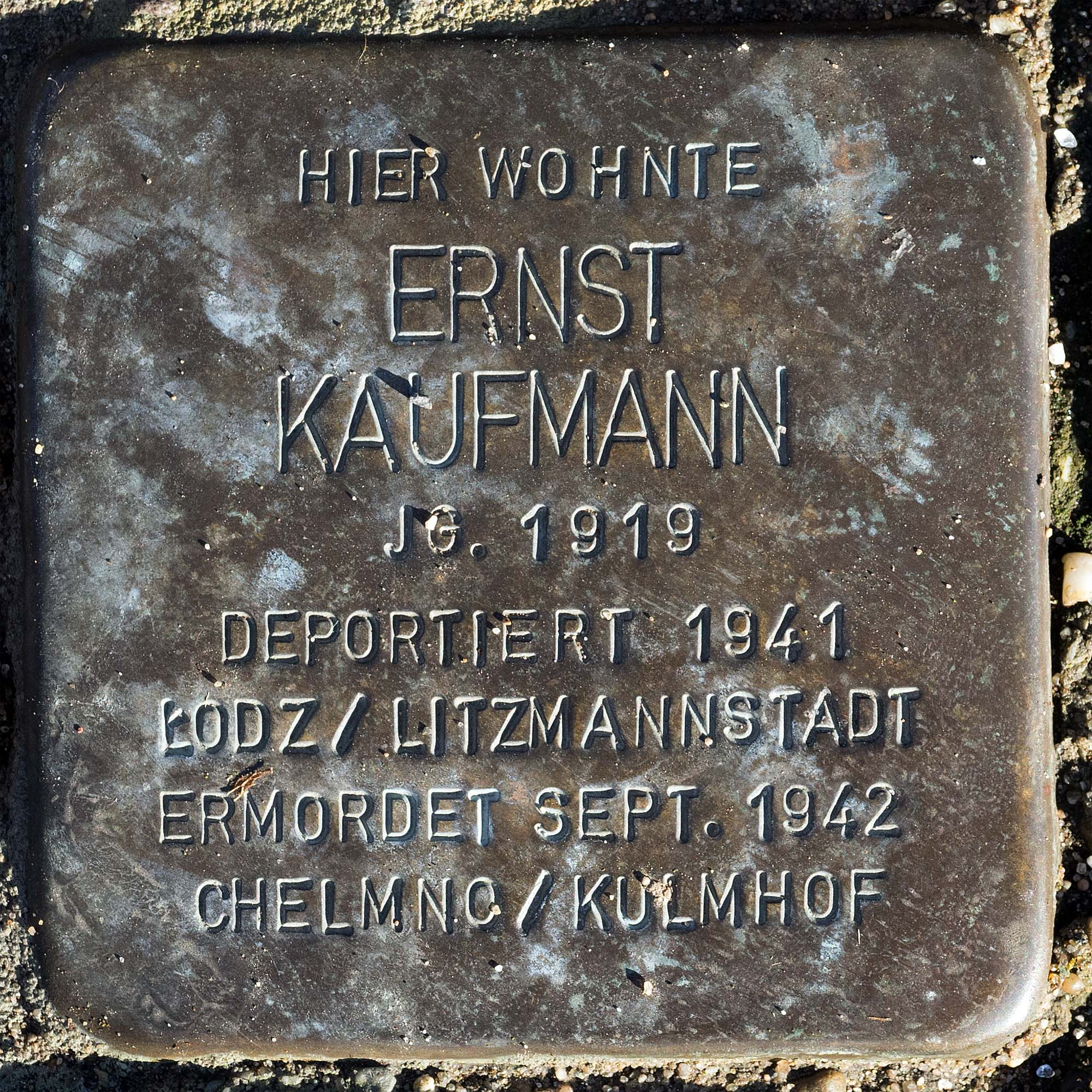 Stolperstein für Kaufmann Ernst